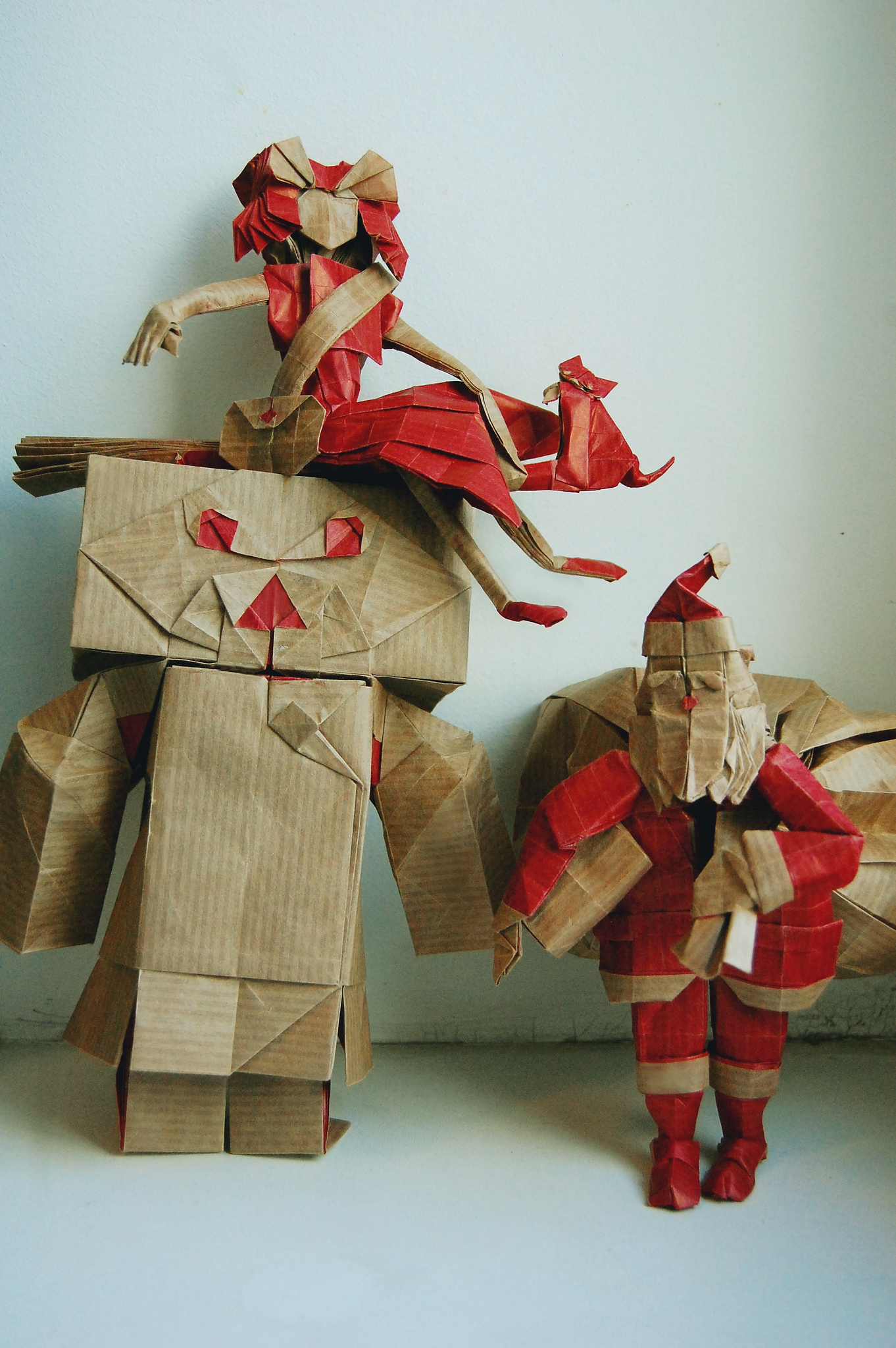 Kartoninis robotukas (Morisue Kei) Magiška mergaitė ant šluotos (Ohtani Mitsugu) ir Kalėdų senelis (Naoki Takeda) - šiuolaikinio moderniojo origamio pavyzdžiai.